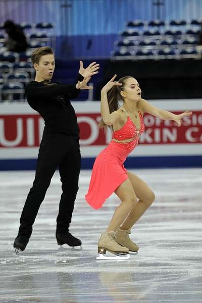 Софья Шевченко / Игорь Ерёменко (Россия) на финале юниорского Гран-при 2017-2018